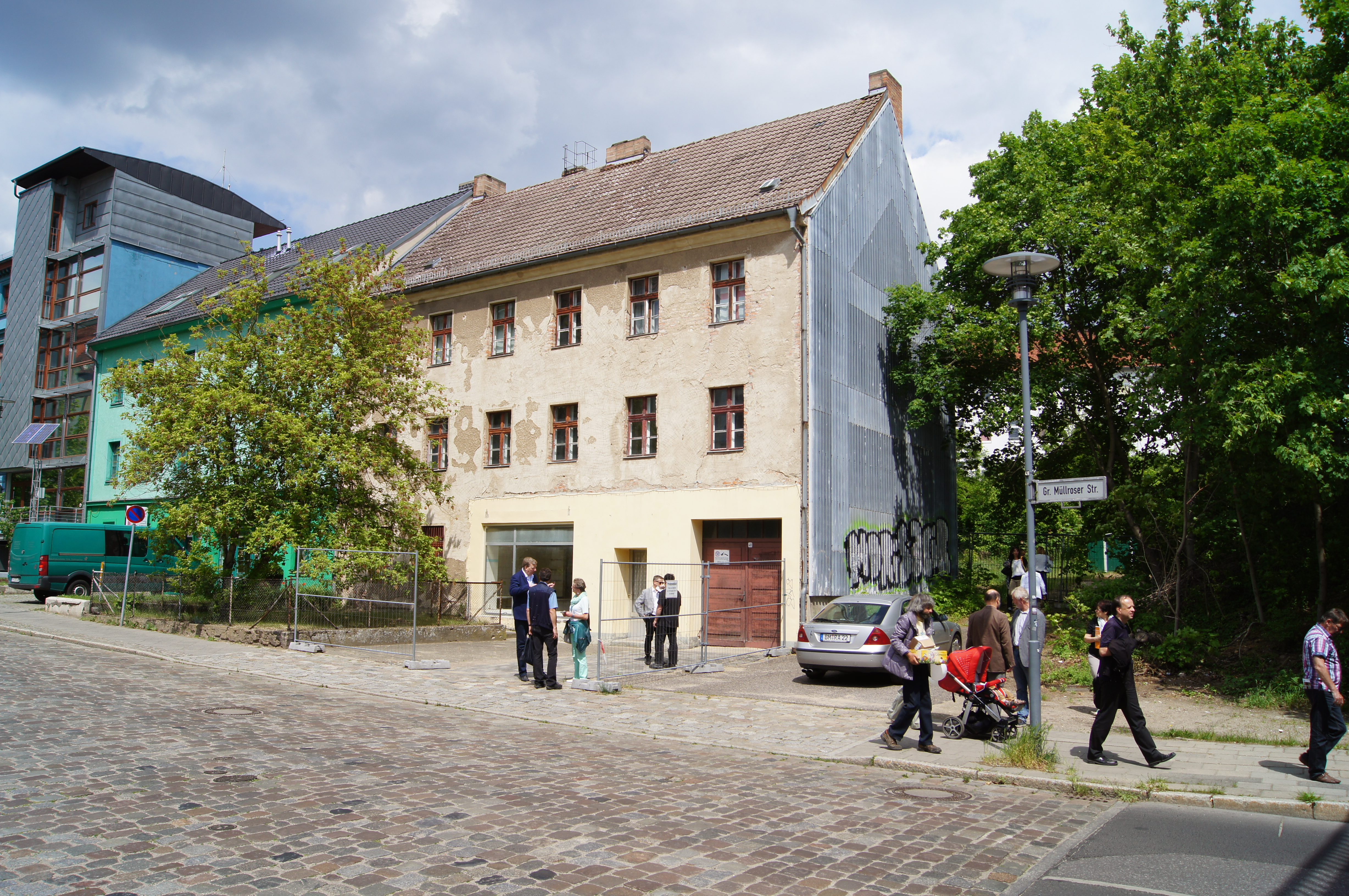 Haus Große Müllroser Straße 48, Frankfurt (Oder), Deutschland